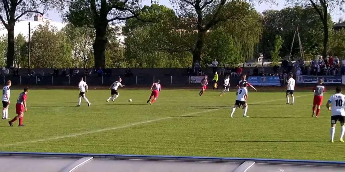 Mecz piłkarski Pogoni Prudnik z LZS Racławiczki rozegrany 5 maja 2018.